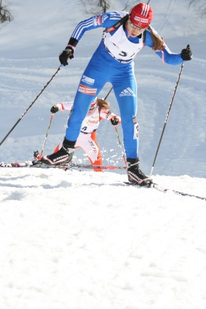 See Title